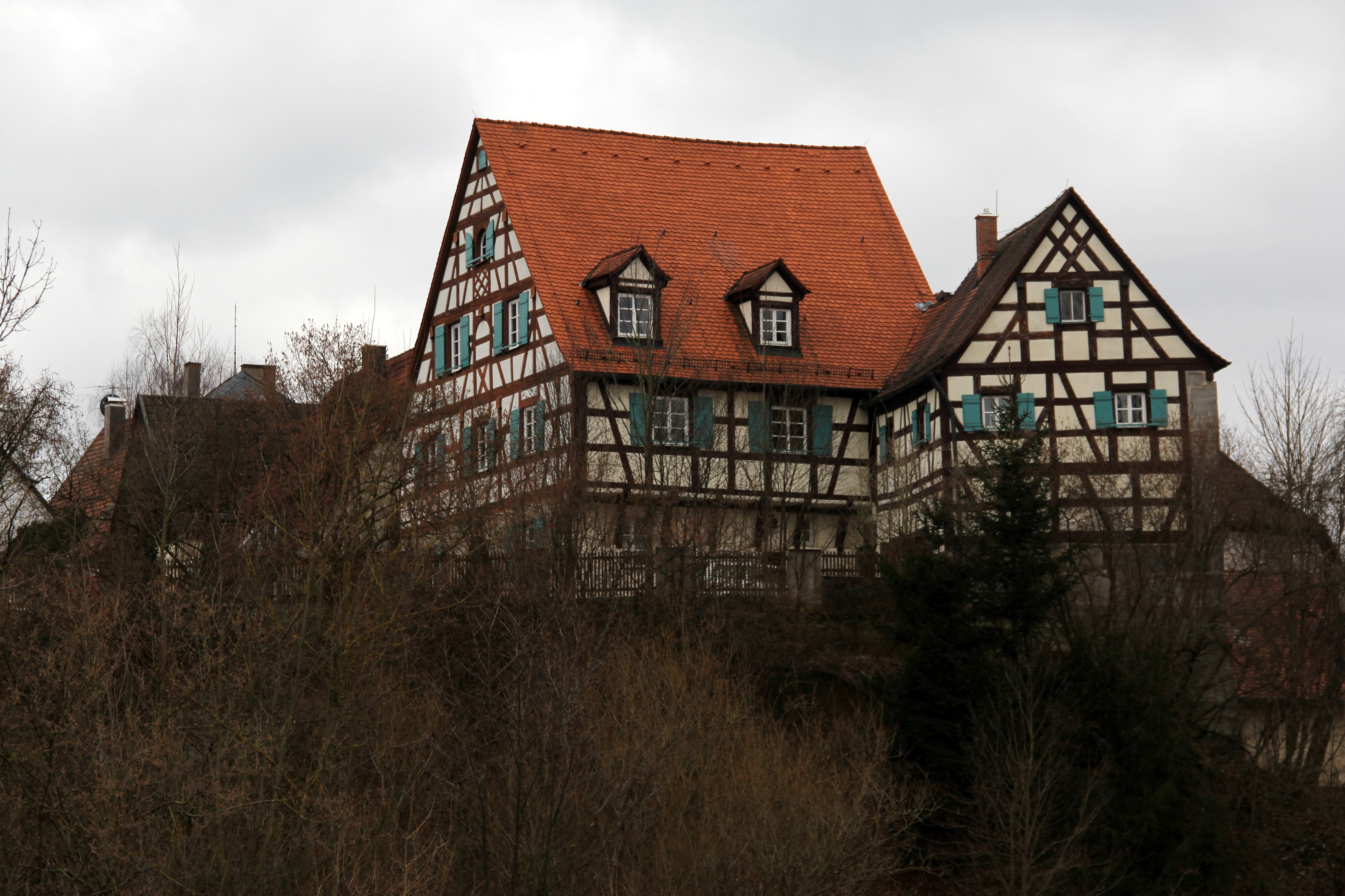 Ehem. Herrensitz, jetzt Pfarrhaus